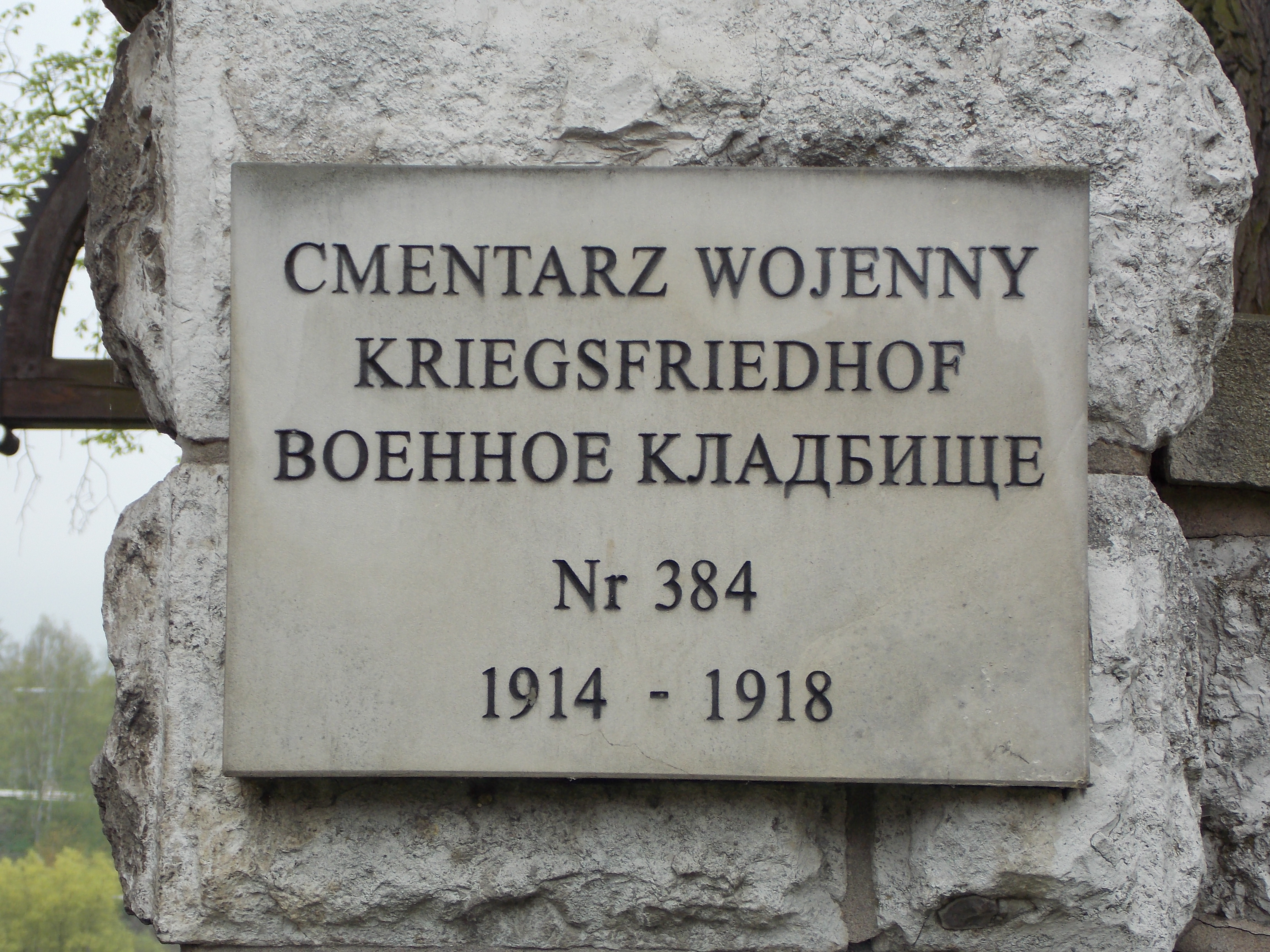 Воинское кладбище № 384, Краков